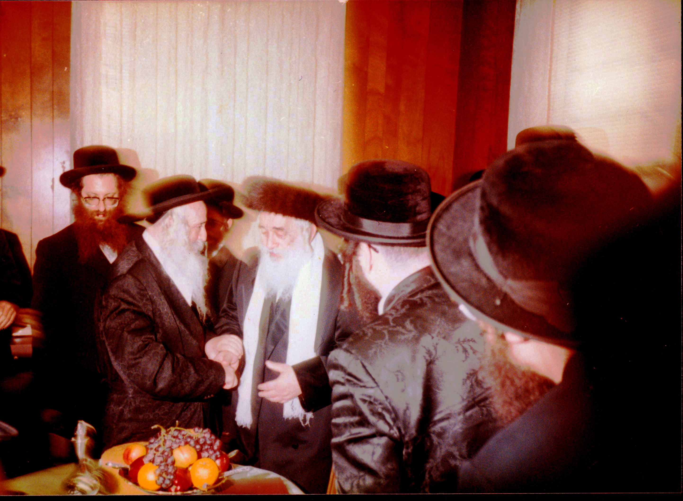 האדמו"ר השפע חיים מצאנז עם האדמו"ר הישועות משה מויז'ניץ